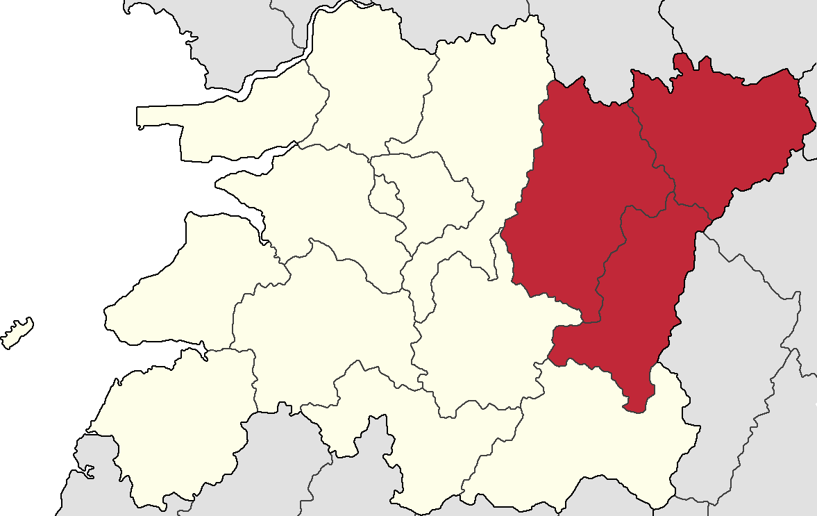 무진장 지방의 지도